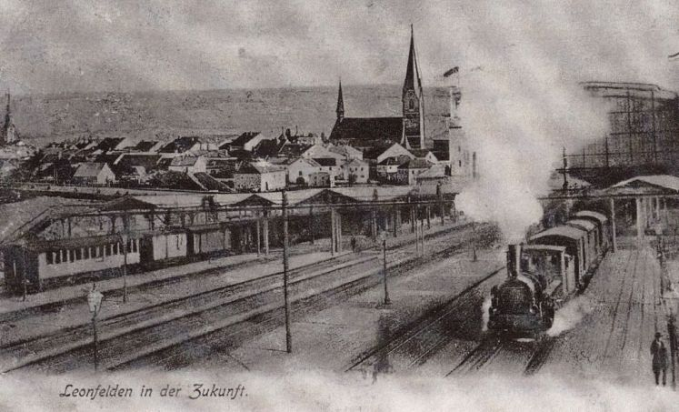 Geplanter Bahnhof in Leonfelden der nicht realisierten Bahnlinie Linz - Leonfelden - Hohenfurth (um 1900)